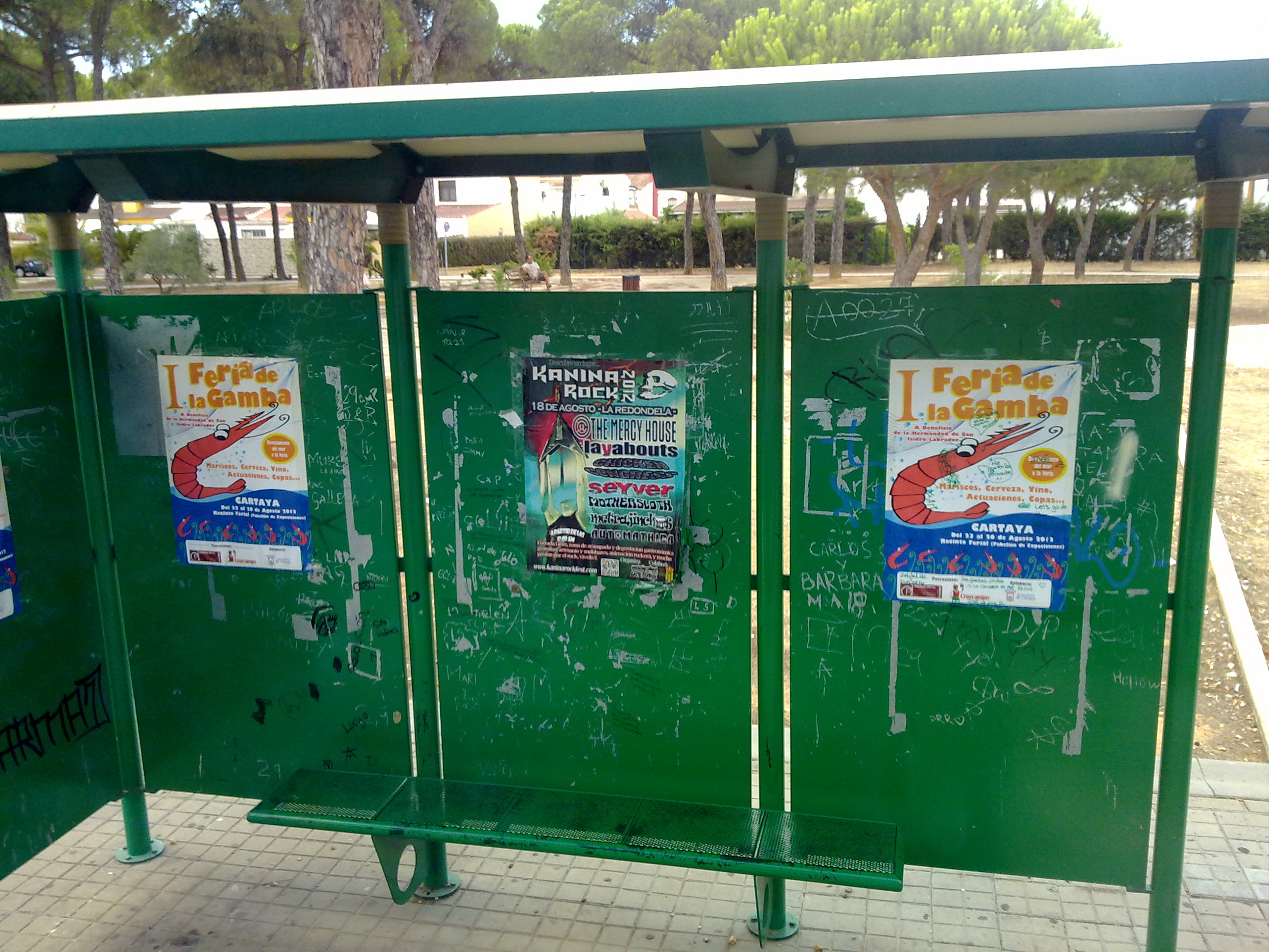 Cartel anunciador del Kanina Rock de La Redondela en una parada de autobús interurbano en el término de Aljaraque (Huelva)